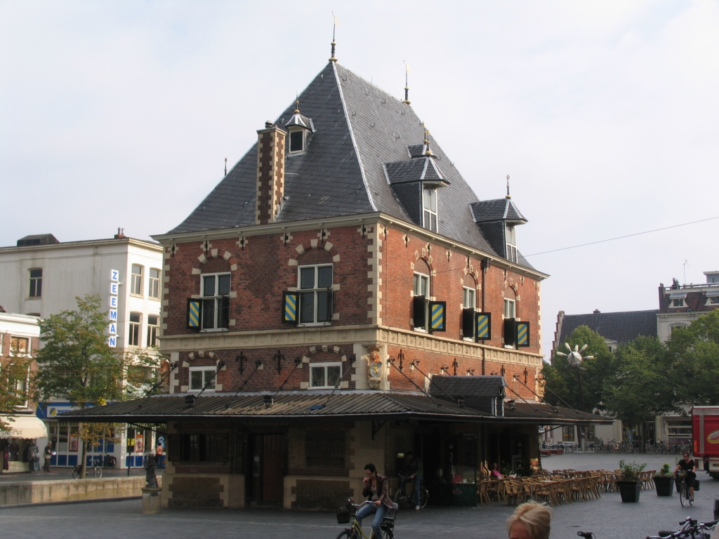 Leeuwarden, Stadtwaage